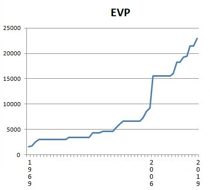 Courbe de progression de la capacité maximum des porte-conteneurs (2019)